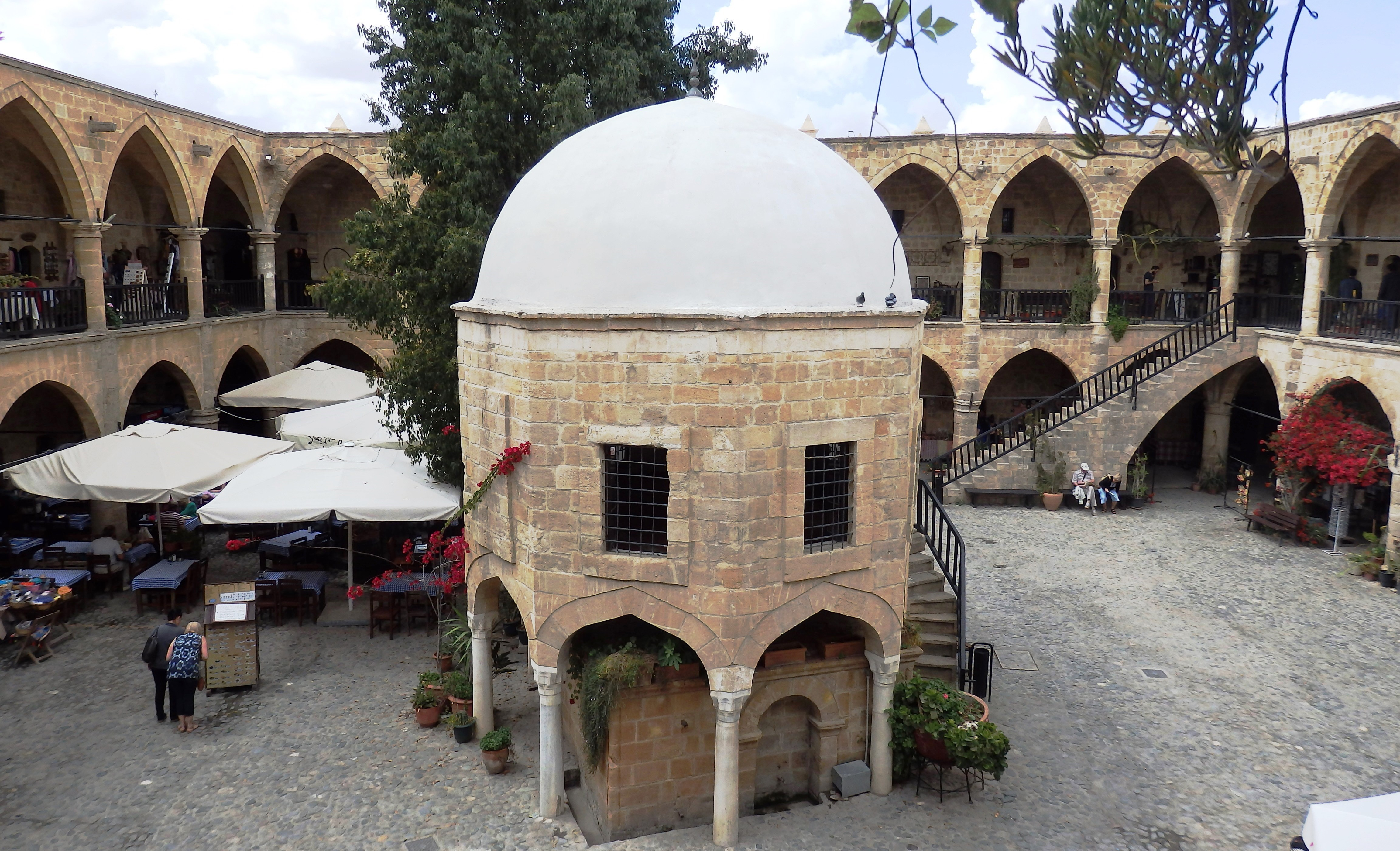 Innenhof des Büyük Han in Nikosia mit oktogonaler Kuppelmoschee in der Mitte